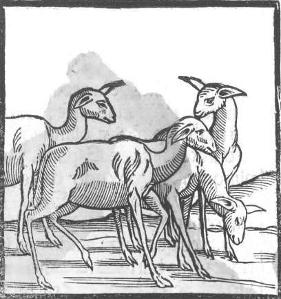 Первое изображение верблюдовых в Европе, 1533